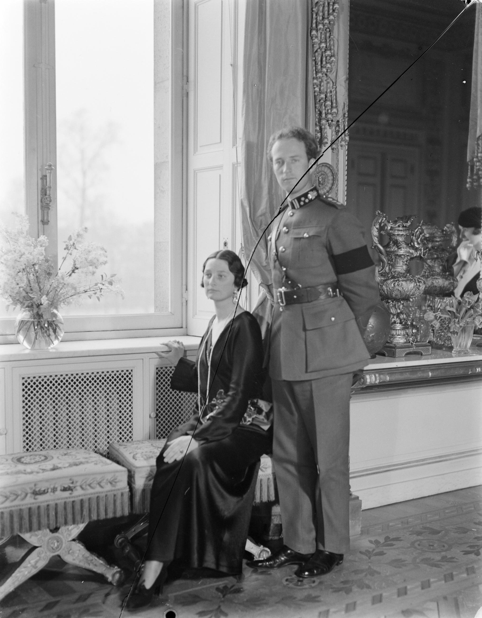 Collectie / Archief : Fotocollectie Van de Poll Reportage / Serie : Koningshuis België Beschrijving : Koning Leopold III en koningin Astrid in hun paleis te Laken Datum : 1934 Locatie : België, Brussel Trefwoorden : interieurs, koningen, koninginnen, paleizen Persoonsnaam : Astrid (koningin België), Leopold III (koning België) Fotograaf : Poll, Willem van de Auteursrechthebbende : Nationaal Archief Materiaalsoort : Glasnegatief Nummer archiefinventaris : bekijk toegang 2.24.14.02 Bestanddeelnummer : 252-1573